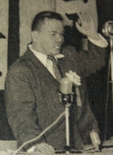 佐郷屋嘉明